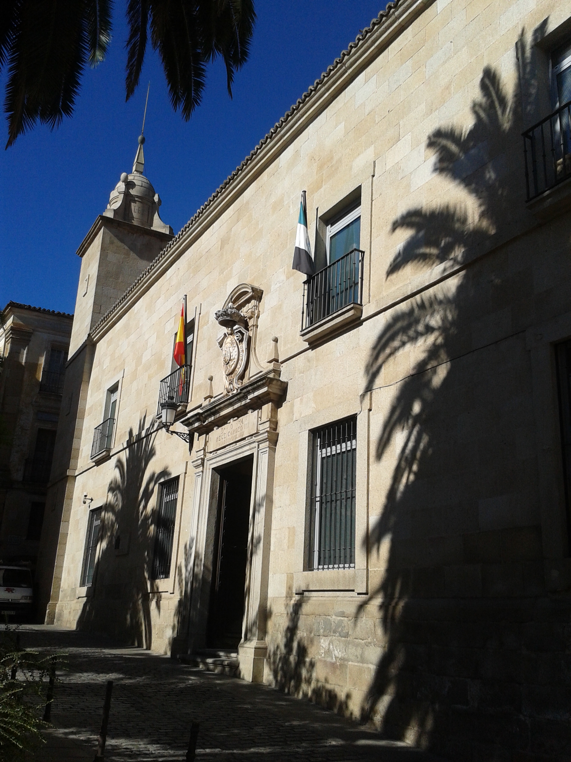 Fachada principal del Tribunal Superior de Justicia de Extremadura en Cáceres (España) Antiguo Hospital de la piedad en el s. XVII y Real Audiencia de Extremadura en el s.XVIII